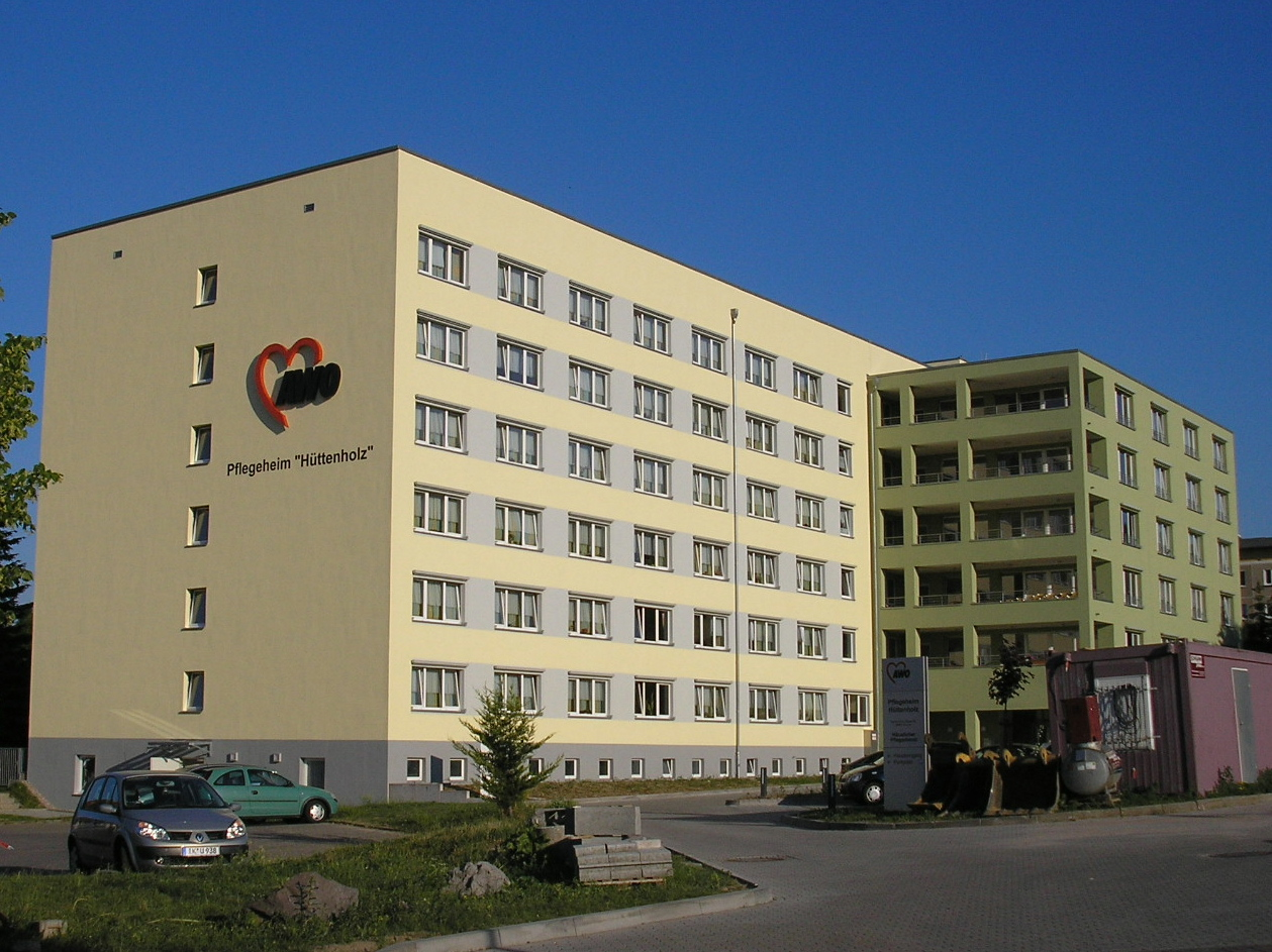 Das Alten- und Pflegeheim der AWO in Ilmenau (Thüringen).